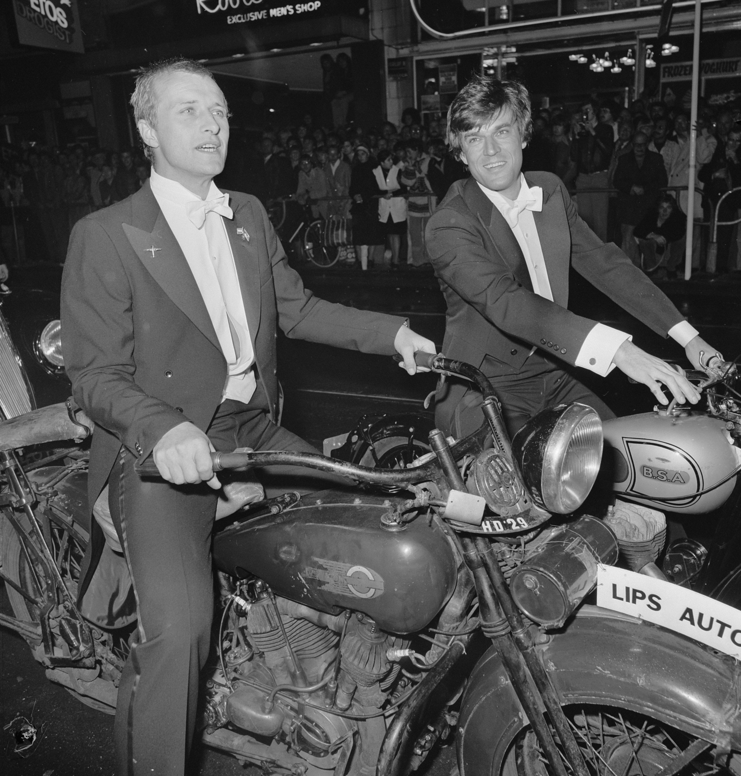 Collectie / Archief : Fotocollectie Anefo Reportage / Serie : De première van de film "Soldaat van Oranje" wordt bijgewoond door koninklijke familie Beschrijving : Rutger Hauer (links) en Jeroen Krabbé op motor bij aankomst Datum : 21 september 1977 Locatie : Amsterdam, Noord-Holland Trefwoorden : acteurs, films, filmsterren, motoren, premieres Persoonsnaam : Hauer, Rutger, Krabbé, Jeroen Fotograaf : Verhoeff, Bert / Anefo Auteursrechthebbende : Nationaal Archief Materiaalsoort : Negatief (zwart/wit) Nummer archiefinventaris : bekijk toegang 2.24.01.03 Bestanddeelnummer : 929-3579